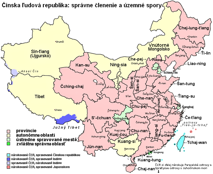 Mapa správneho členenia Čínskej ľudovej republiky a jej územných sporov.